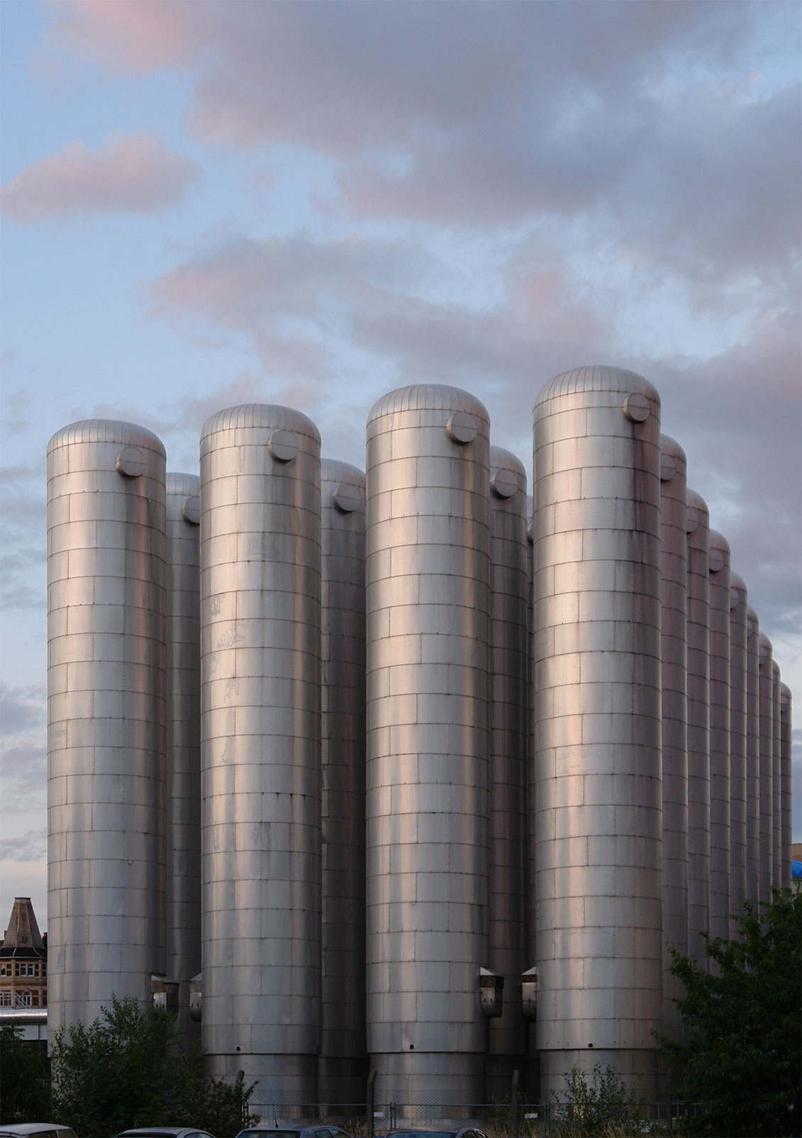 Fernwärmespeicher an der Georgstraße Chemnitz